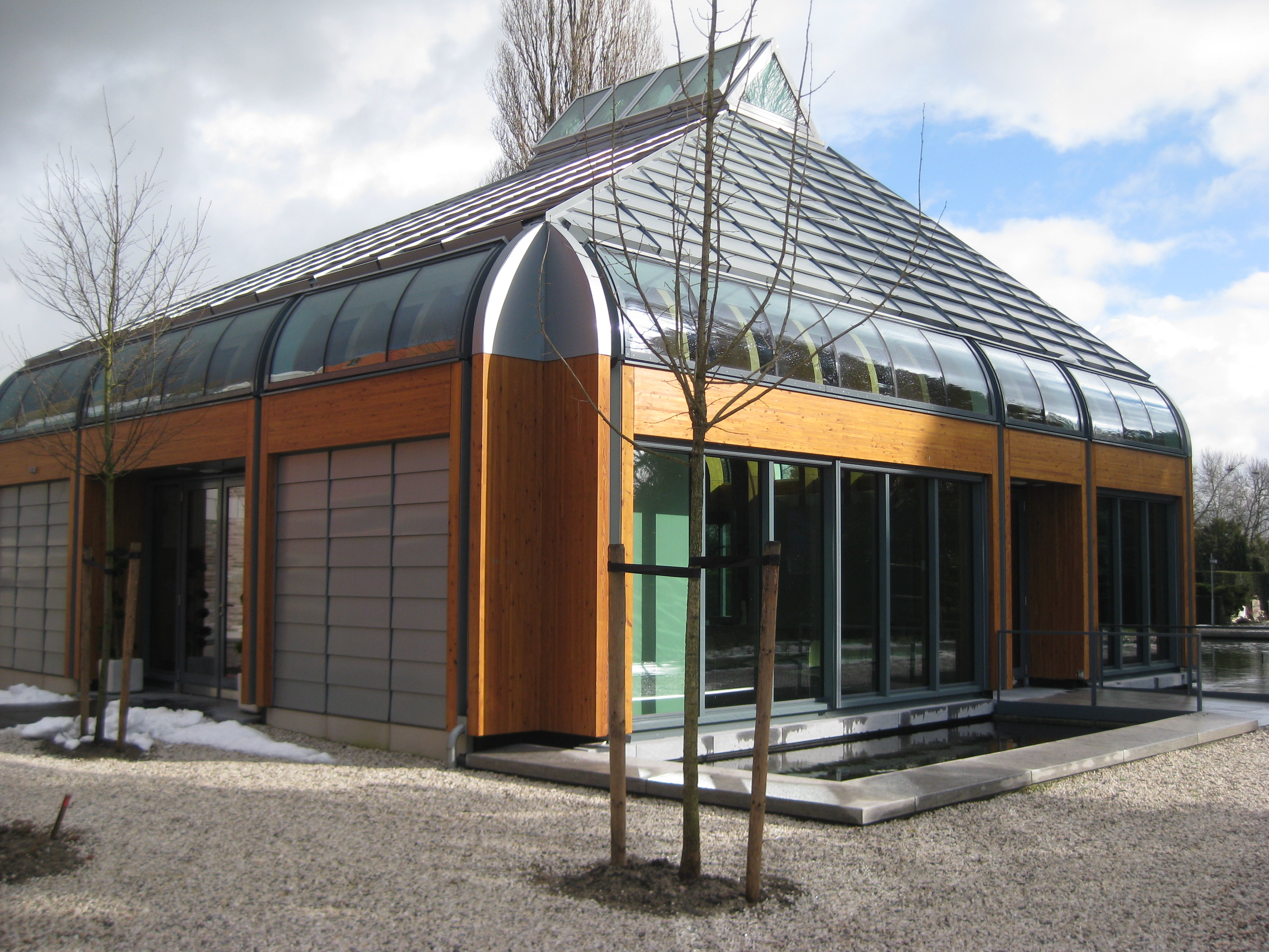 Aula van begraafplaats en crematorium De Nieuwe Noorder in Amsterdam-Noord